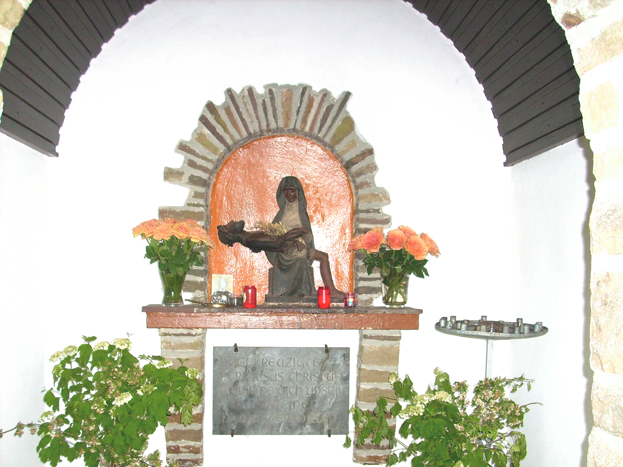 Inneres des Heiligenhäuschens bei Hörscheid, Pieta